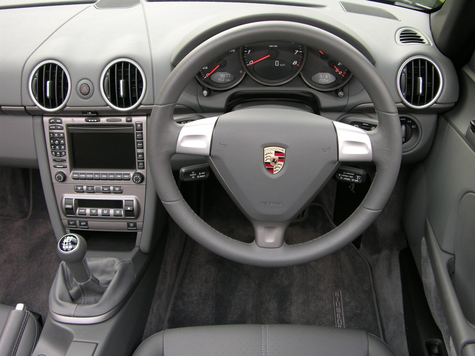 Porsche Boxster 2.7